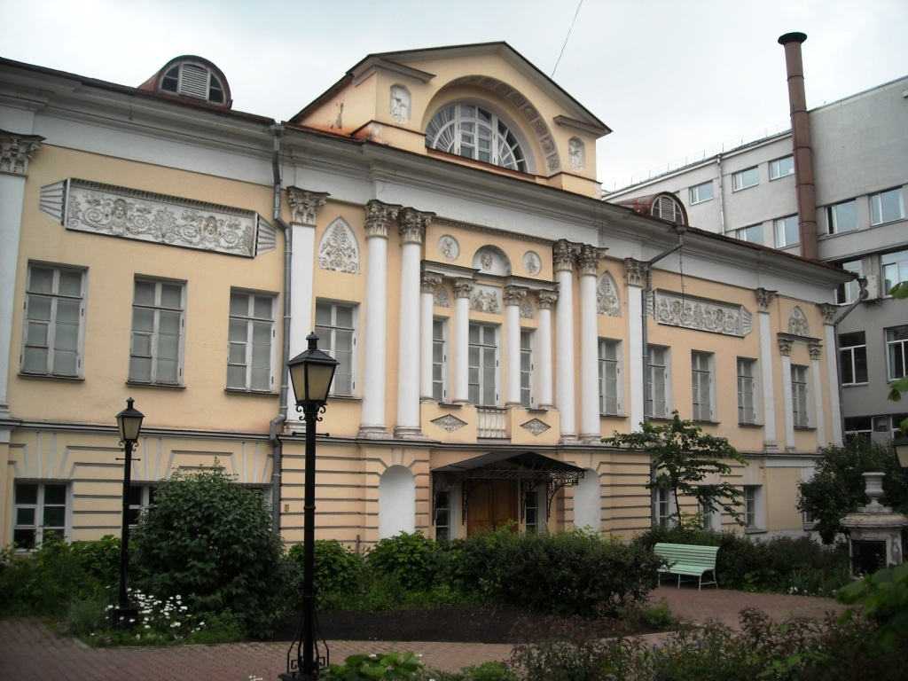 Casa dei principi Trubetzkoj, Osip Bove